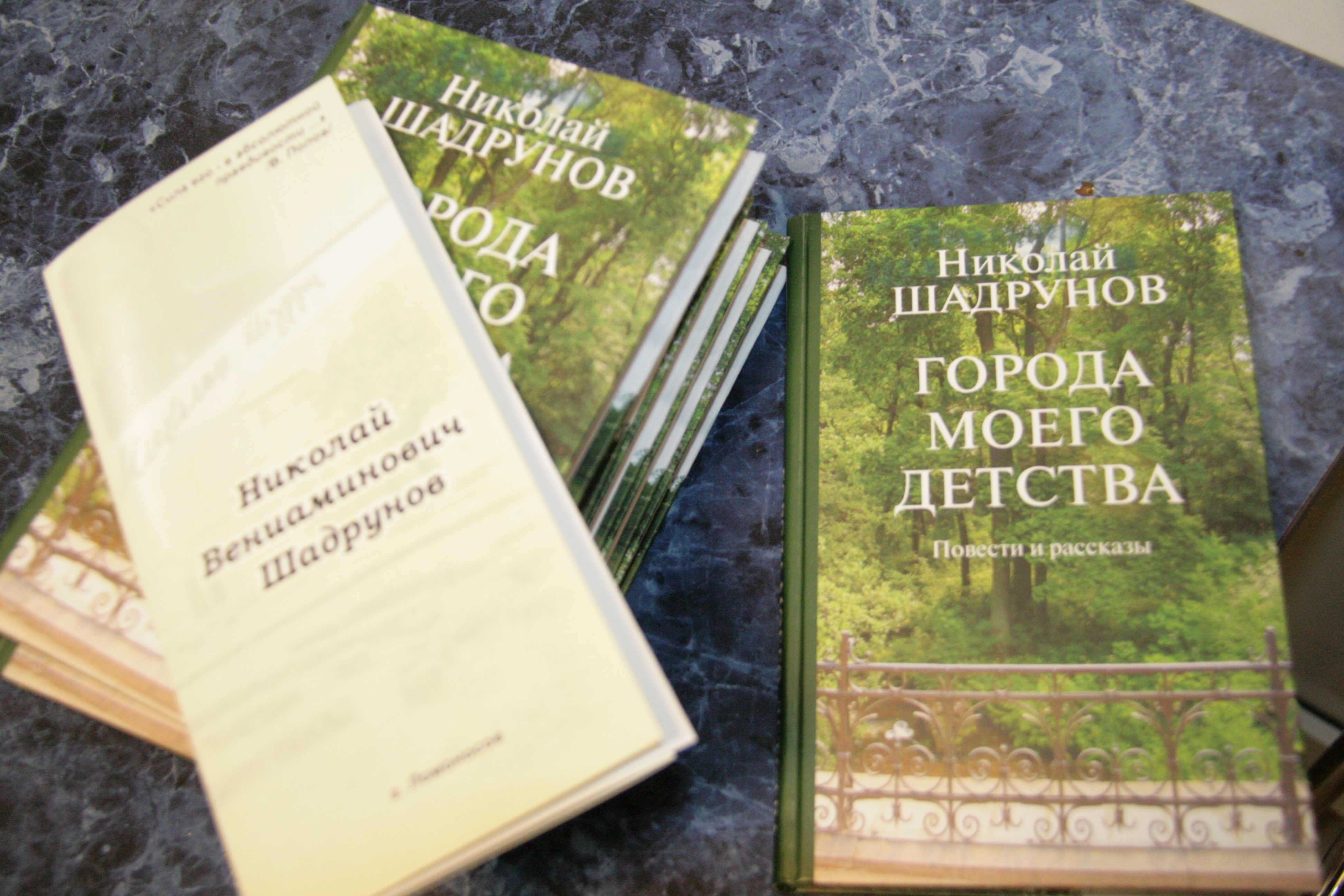 Книга Н.В. Шадрунова "Города моего детства"